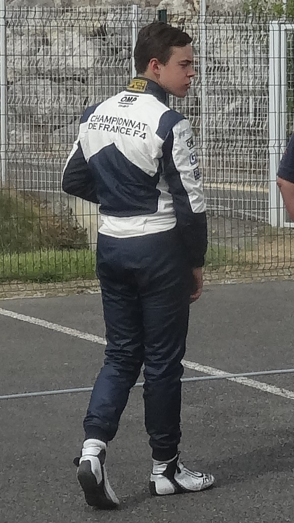 52e Coupes de Pâques (sport automobile), sur le Circuit Paul Armagnac à Nogaro (Gers) : F4 France - Paul-Adrien Pallot.